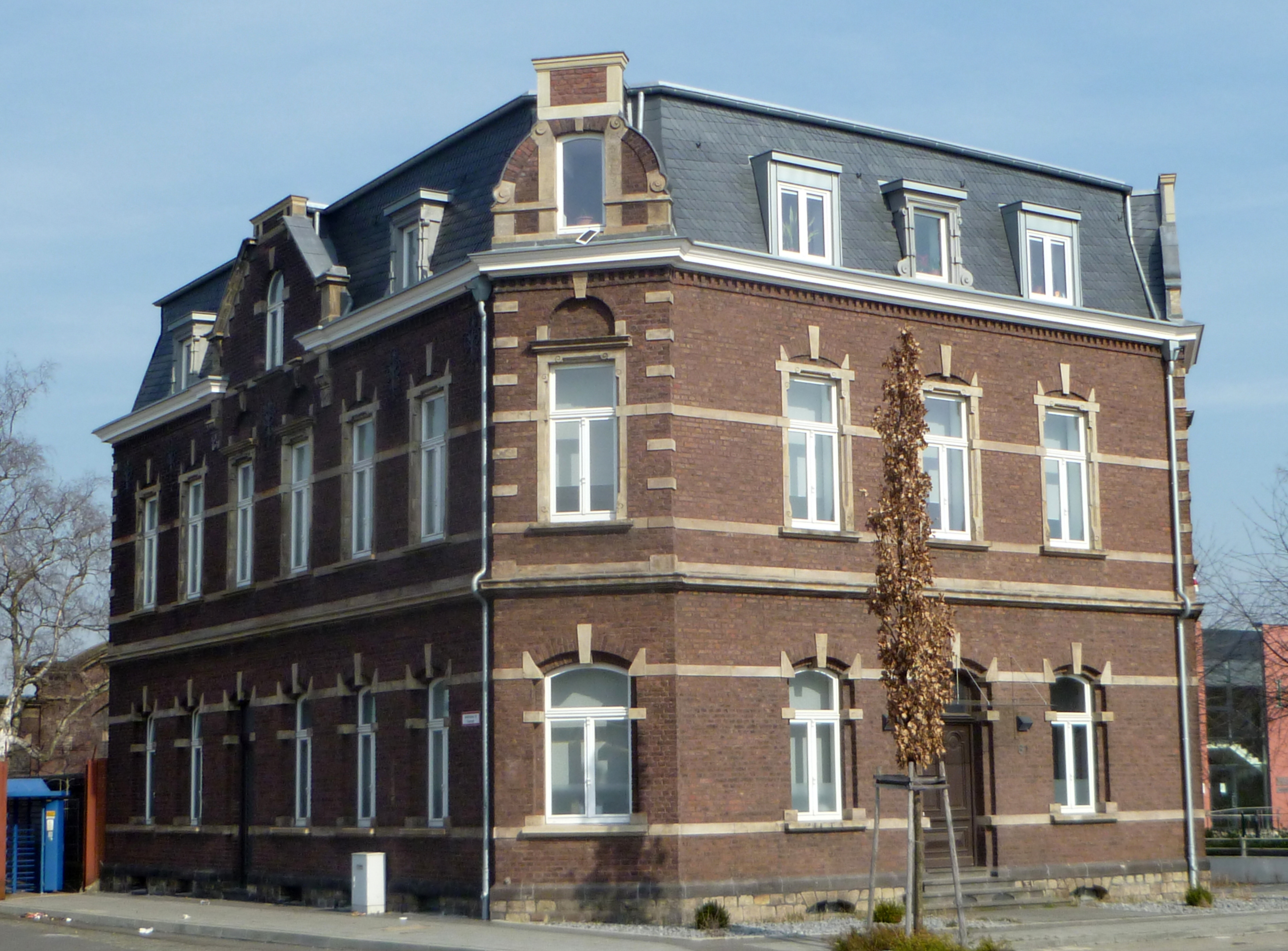 Alter Schlachthof Aachen; Verwaltungs- und Direktionsgebäude; Baudenkmal